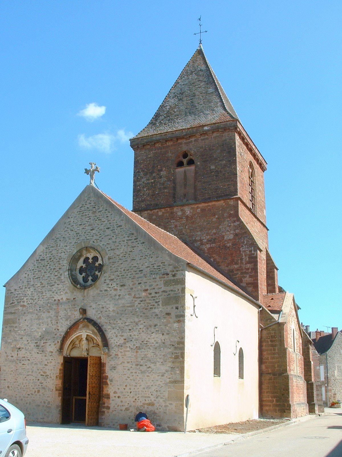 Eglise Saint-Rémi de Guillon (Yonne)